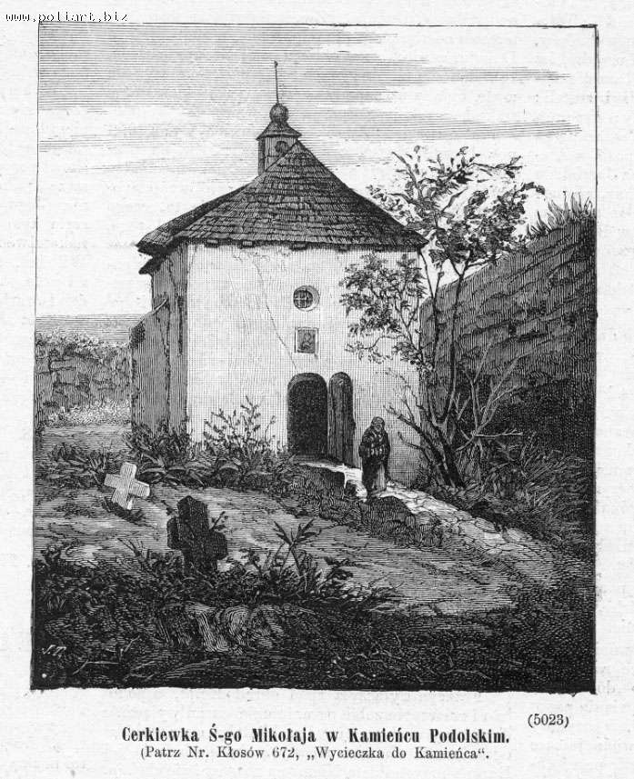 Вірменська церква Благовіщення. Кам'янець Подільський: Вірменська церква Благовіщення. Кам'янець Подільський